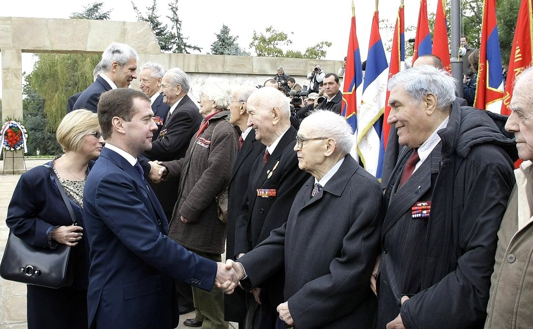 20 октября 2009 года БЕЛГРАД, СЕРБИЯ. С ветеранами Великой Отечественной войны у Монумента освободителям Белграда и Монумента советским воинам.